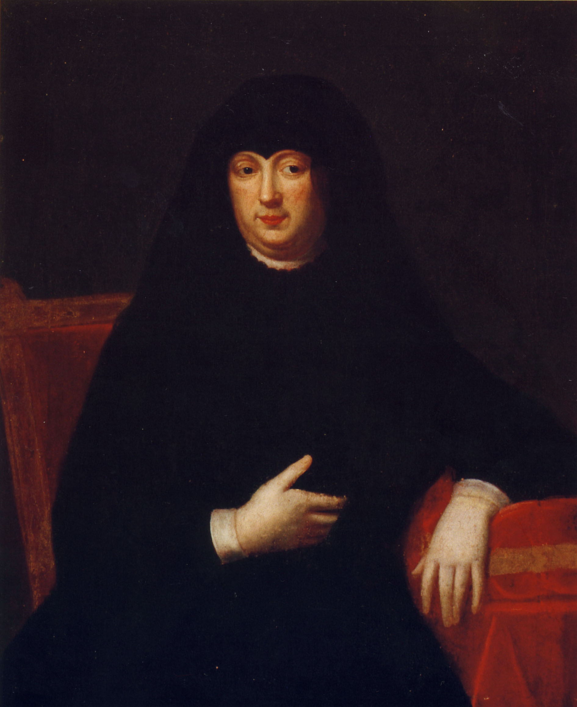 Беларуская (тарашкевіца): Партрэт Ганны Кацярыны Радзівіл (Hanna Kaciaryna Radzivił)